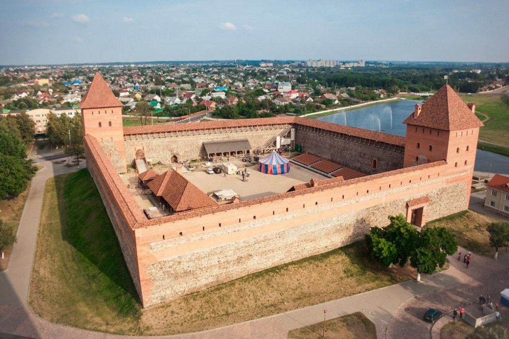 Беларуская (тарашкевіца): Ліда, замак да аднаўленьня